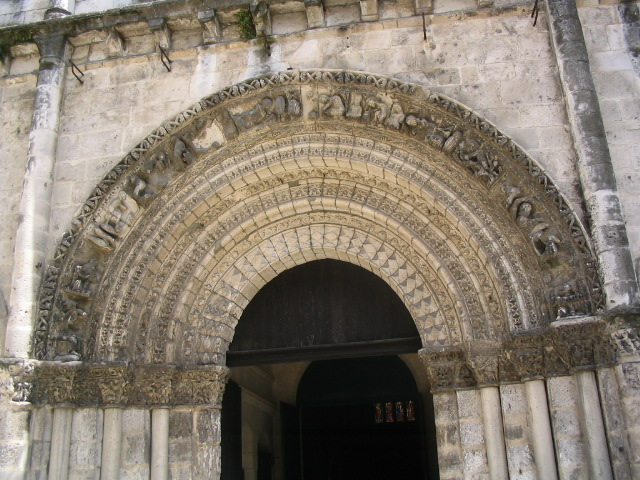 Le Zodiaque de l'Eglise St Léger de Cognac. Photo prise le 29 juillet 2006 vers 14h35 par moi